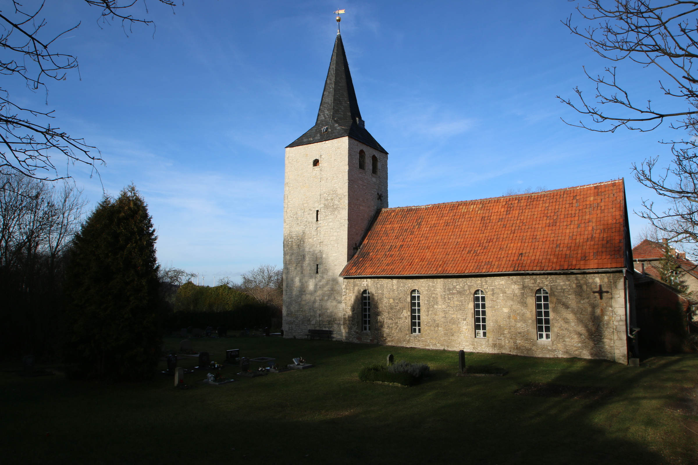 Blick auf die Dorfkirche in Huy-Neinstedt